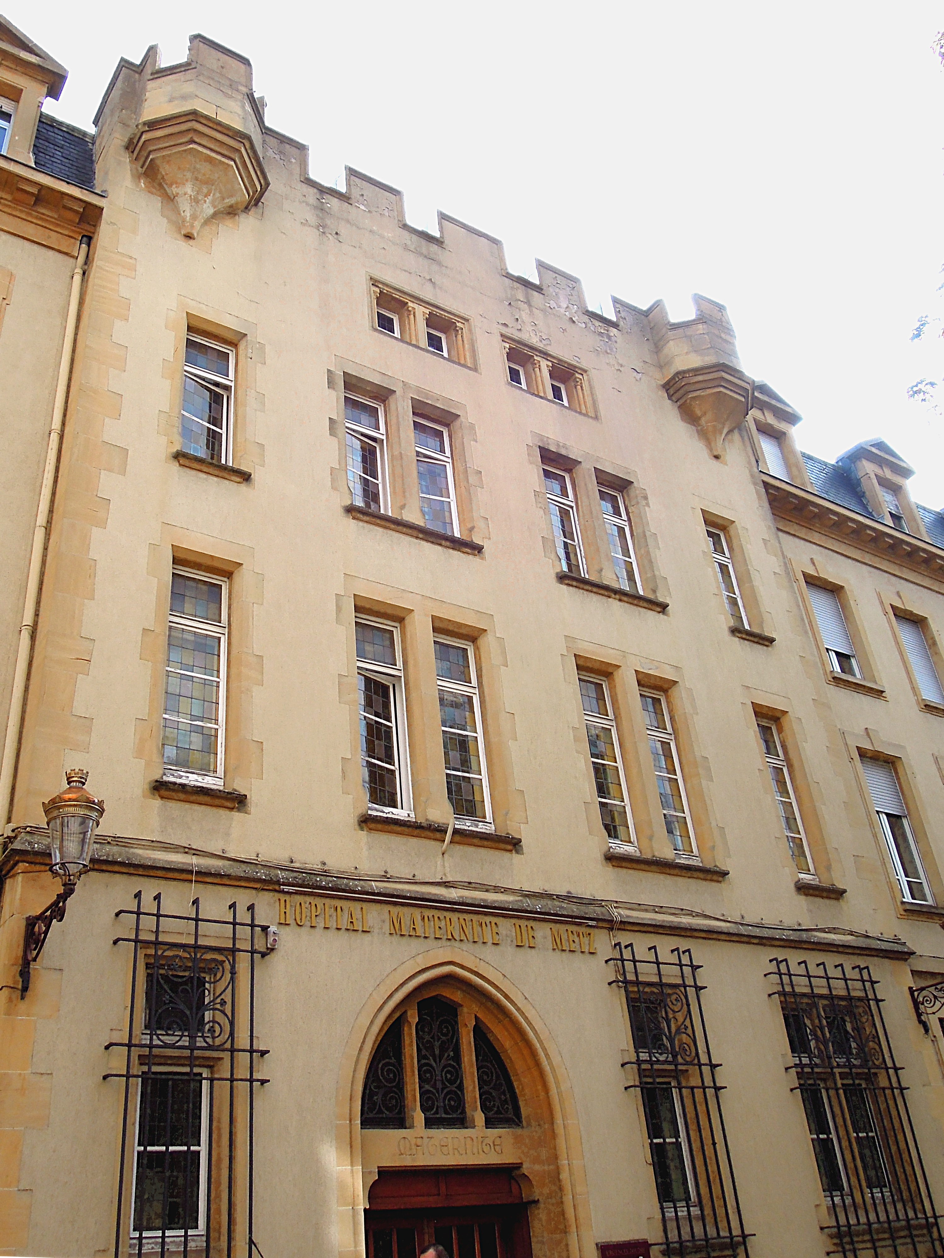 Construction du 14e siècle abritant aujourd'hui une maternité. Il ne reste plus que les créneaux, les fenêtres et la porte d'origine. .